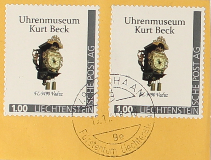 Diese Sondermarke wurde von der Liechtensteinischen Post AG anlässlich der Eröffnung des Uhrenmuseums im Jahr 2018 aufgelegt.